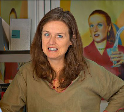 Ouka Leele en una caseta de la Feria del Libro de Madrid 2007, firmando ejemplares de su libro.